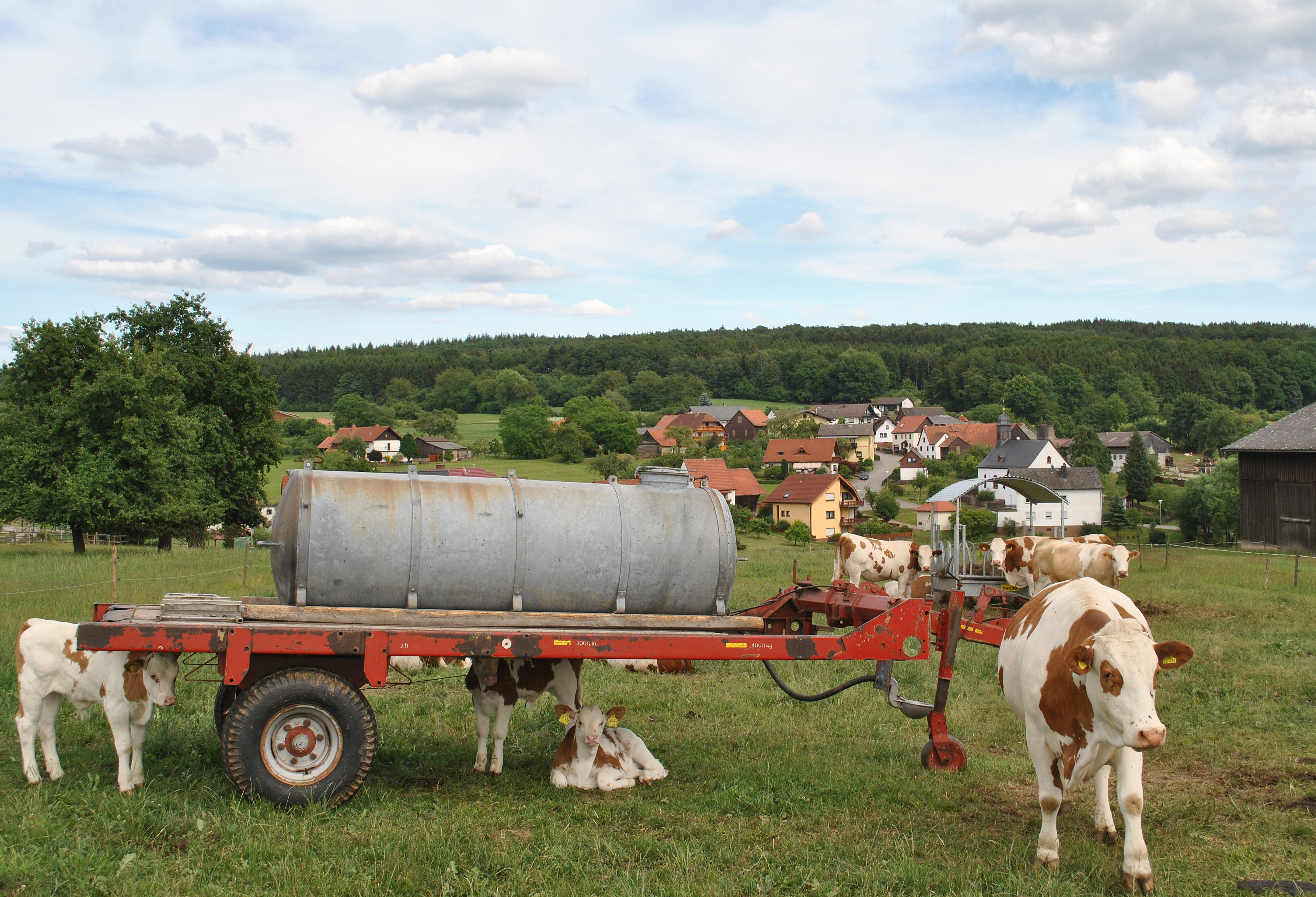 Viehwirtschaft am westlichen Ortsrand von Hesselbach